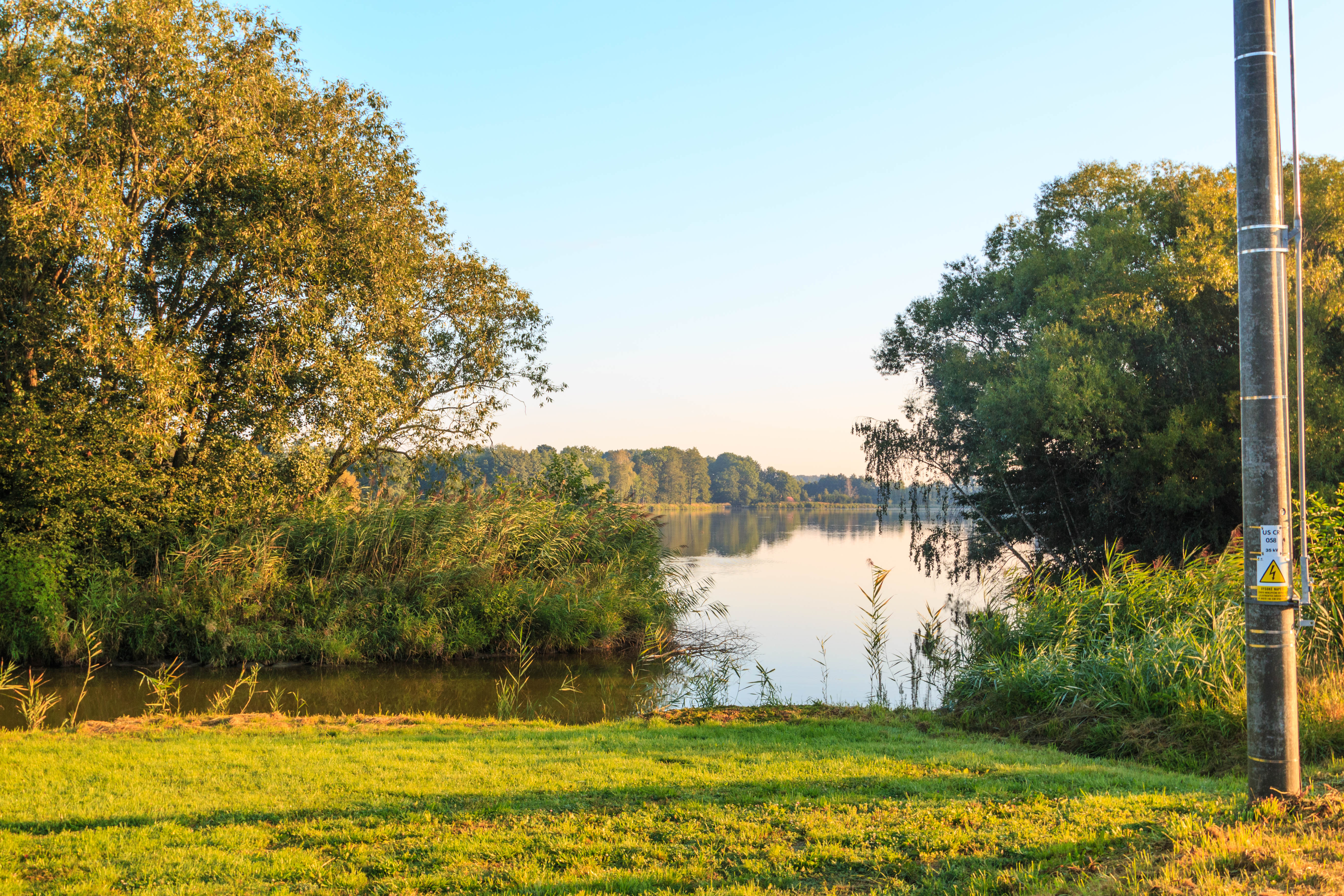 Rybník Petráň u Dubové